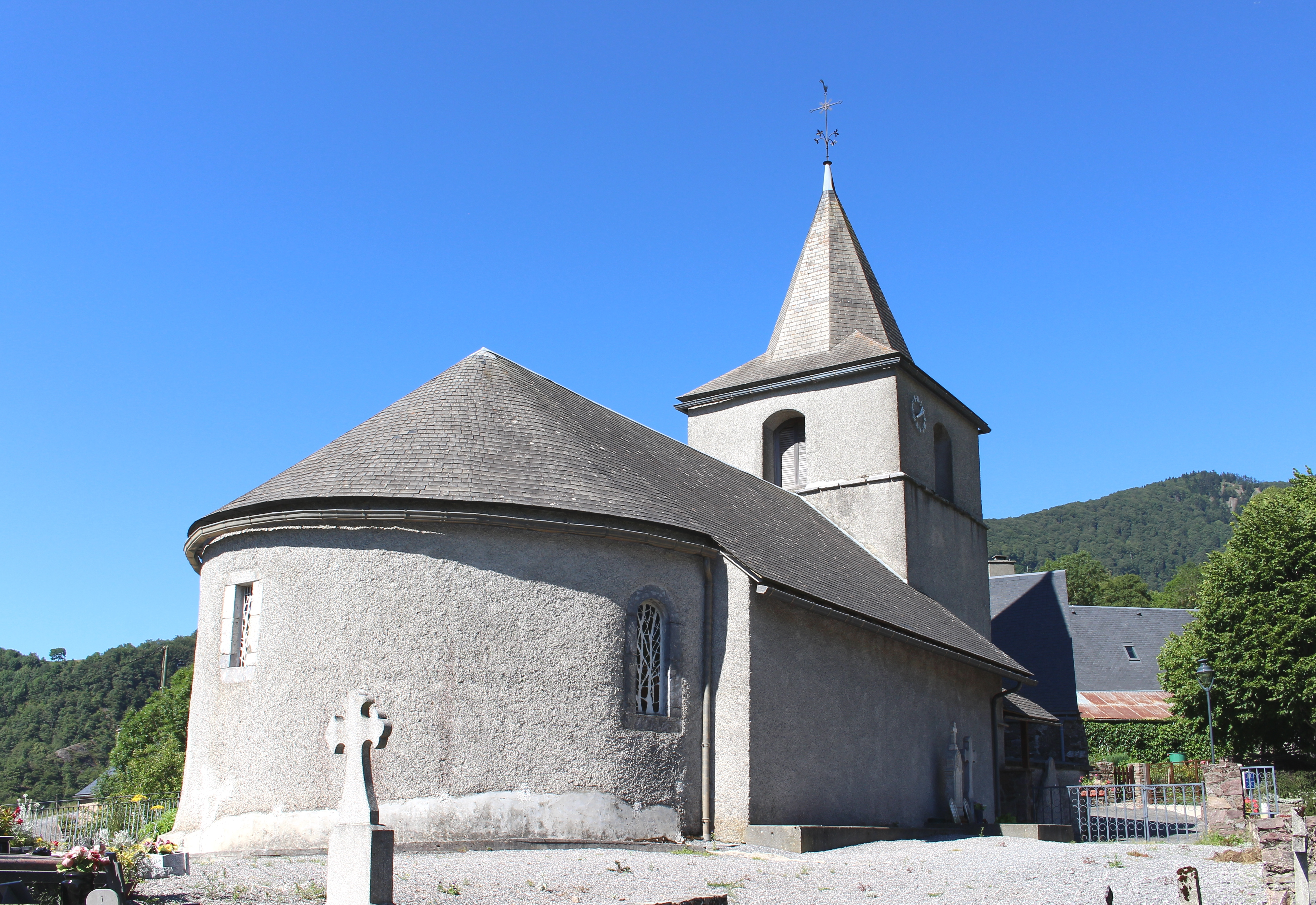 Église Saint-Geniès de Jumet (Hautes-Pyrénées)